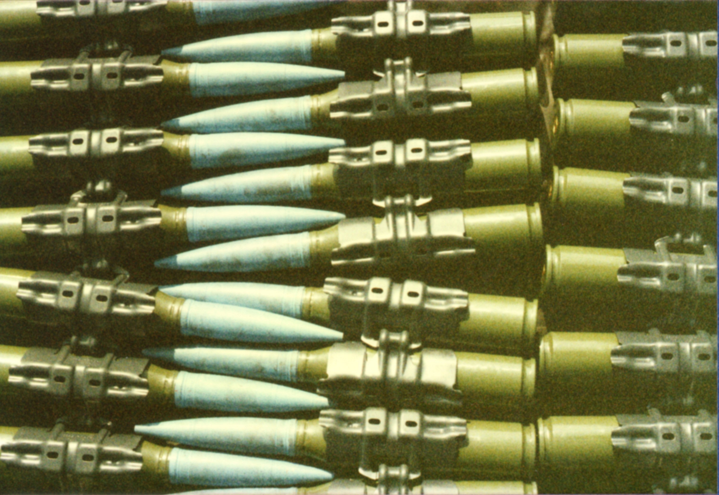 Gegurtete Übungsmunition 35 mm für den Flugabwehrpanzer Gepard